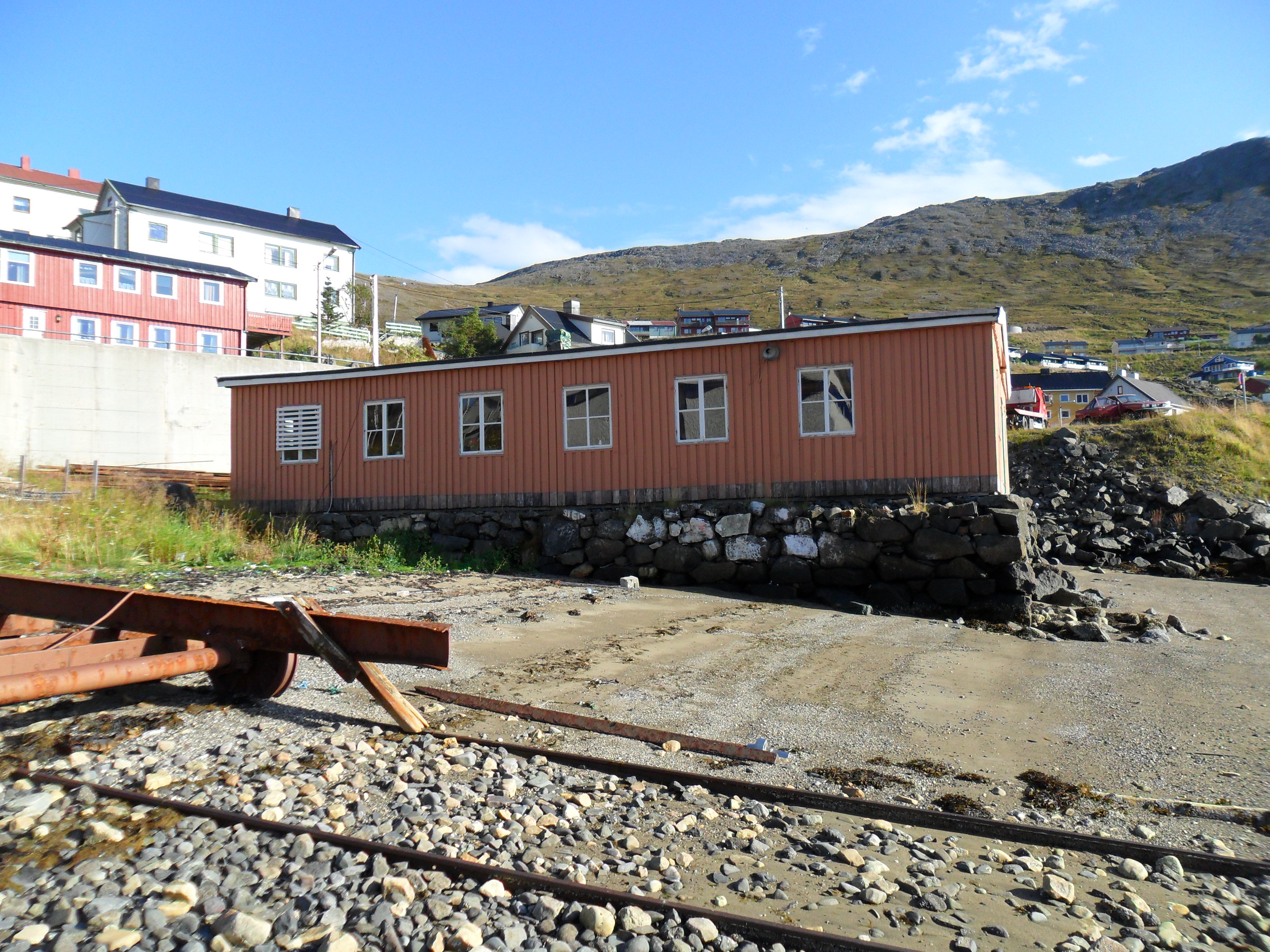 Brødrene Isaksens Pantentslipp a/s i Storbukt, Nordkapp kommune, Finnmark. Fra gjenreisningen efter krigen.